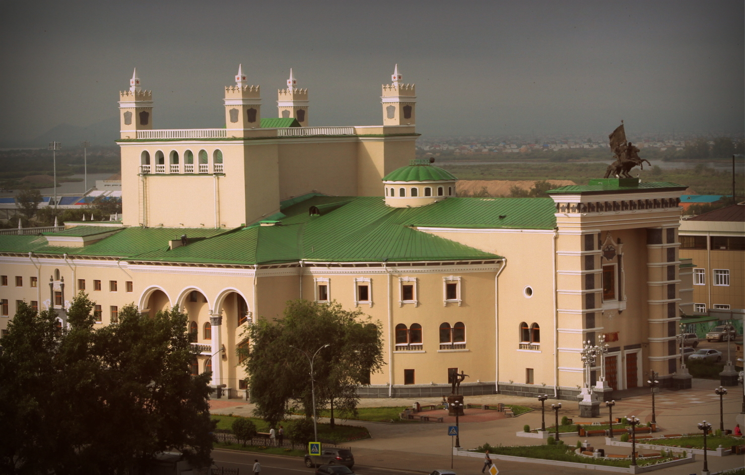 Бурятский государственный академический театр оперы и балета после реконструкции.